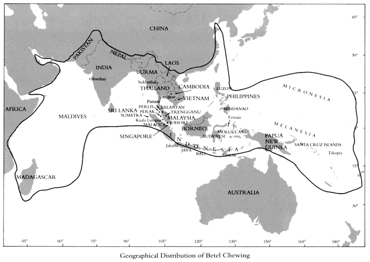 (Dawn, 1995)